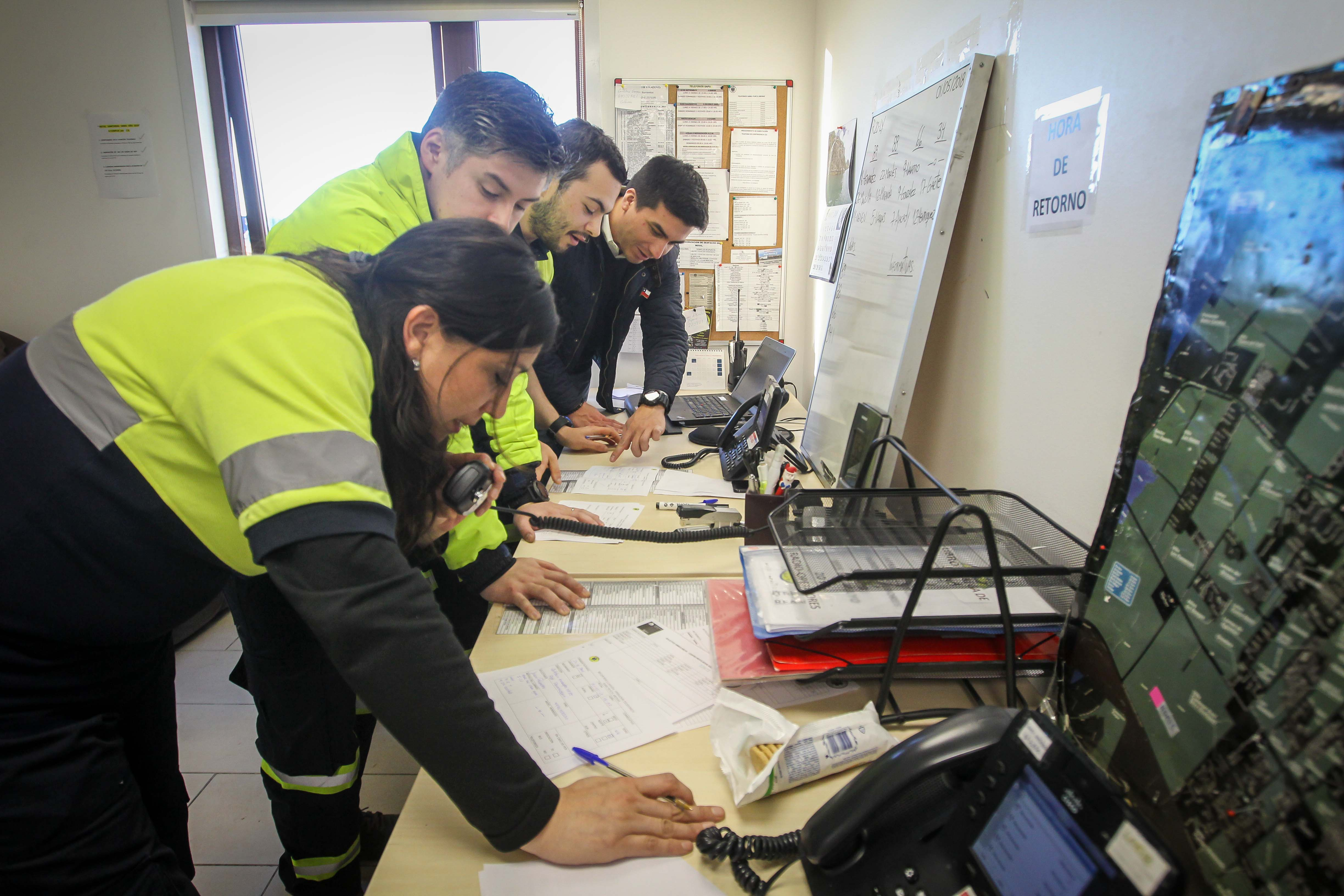 Saludo personal SAMU